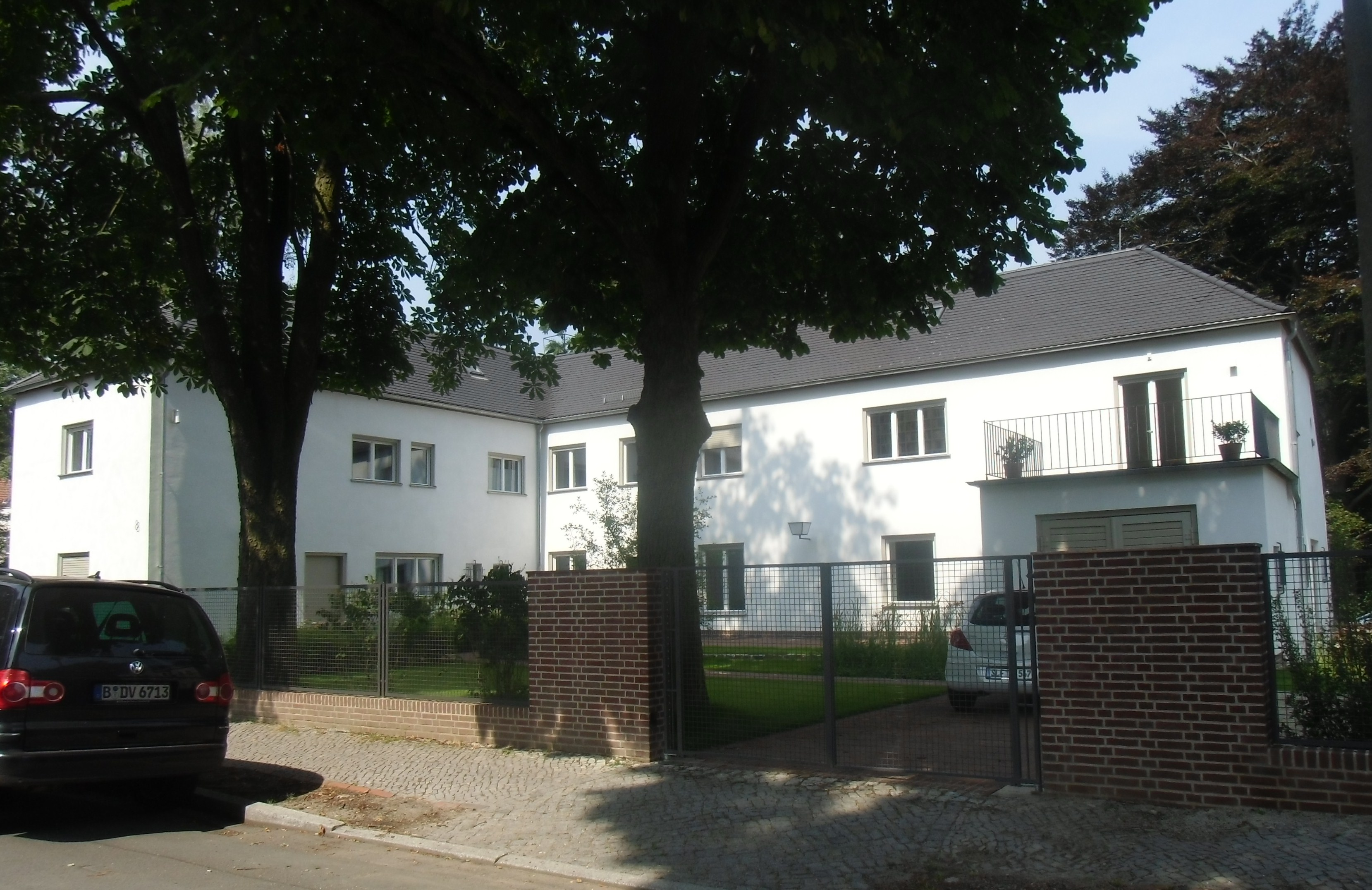 Denkmalgeschütztes Landhaus Westrick am Ufer des Griebnitzsees, Fehler im Dateinamen, richtige Anschrift ist Stubenrauchstraße 8